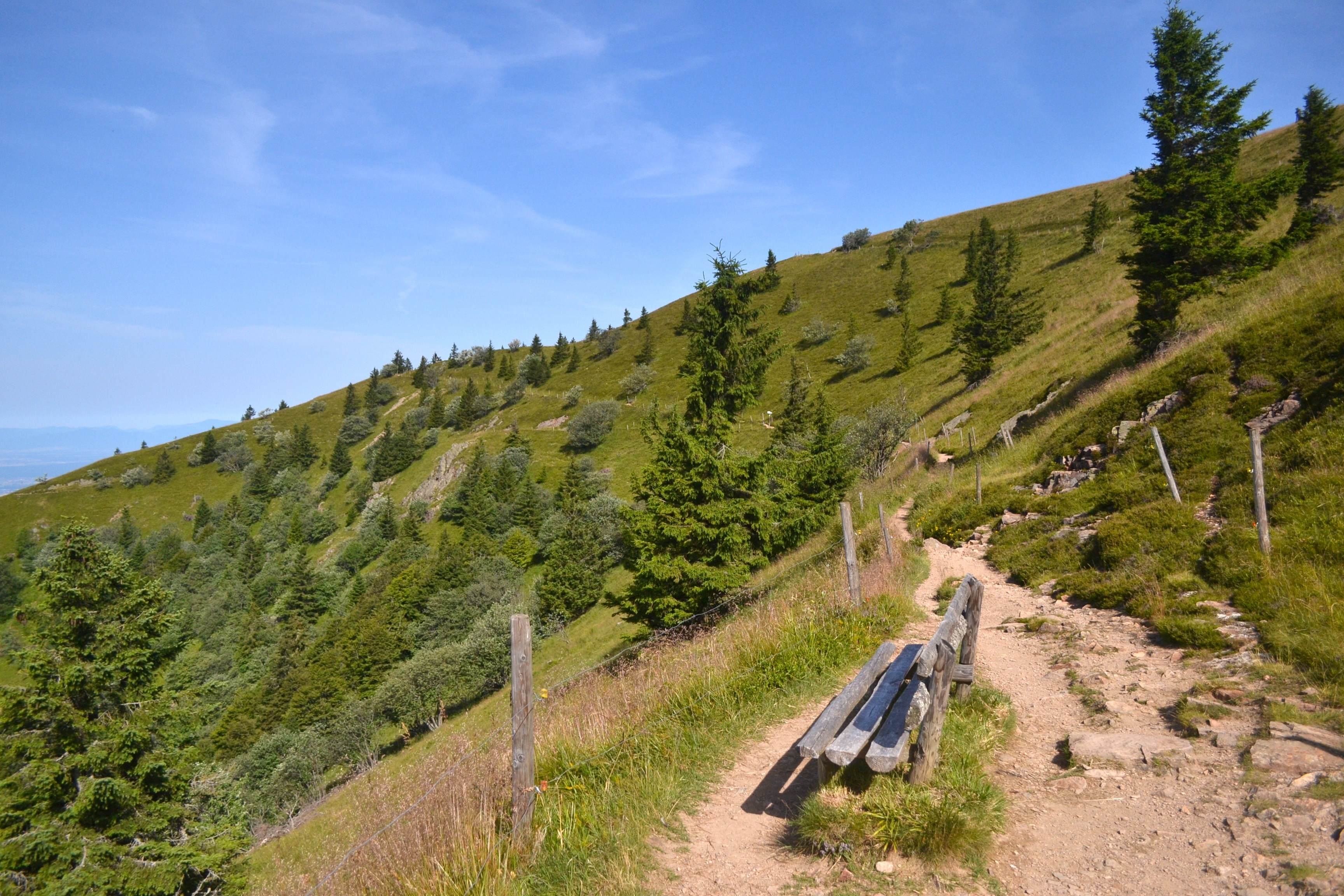 Walking trail on Belchen.